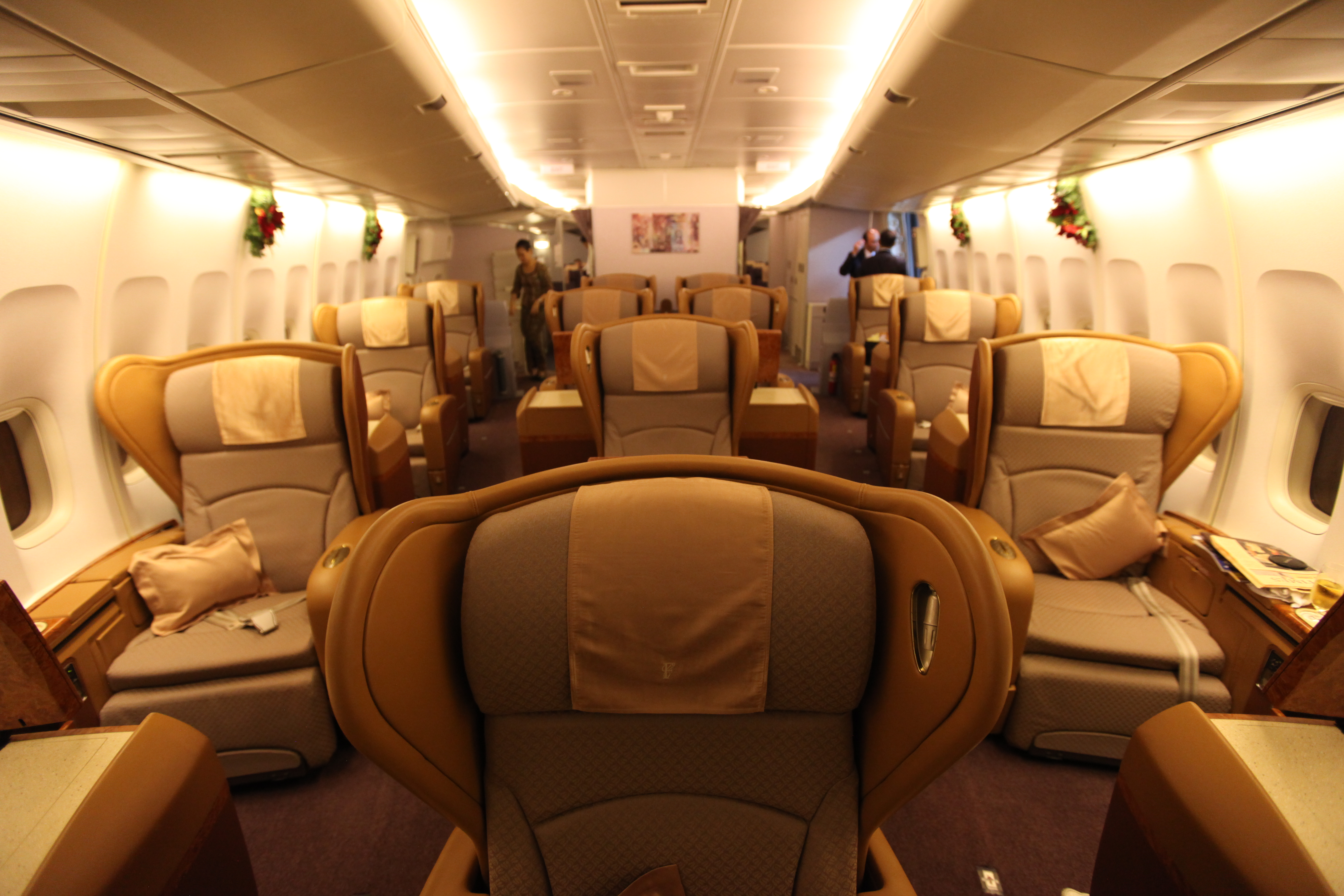 SQ 747